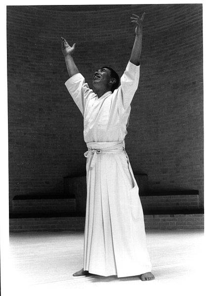 Noro Masamichi, fondateur du Kinomichi